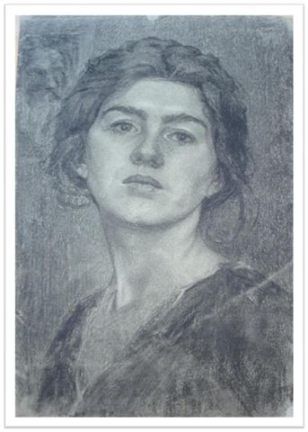 Margarete Depner, Selbstporträt: 48x30,3; Kohle